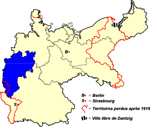 Territoires couverts par la Fédération de football d'Allemagne occidentale (WSV) de 1905 à 1933 Catégorie:Logo Fédérations Allemandes de Football